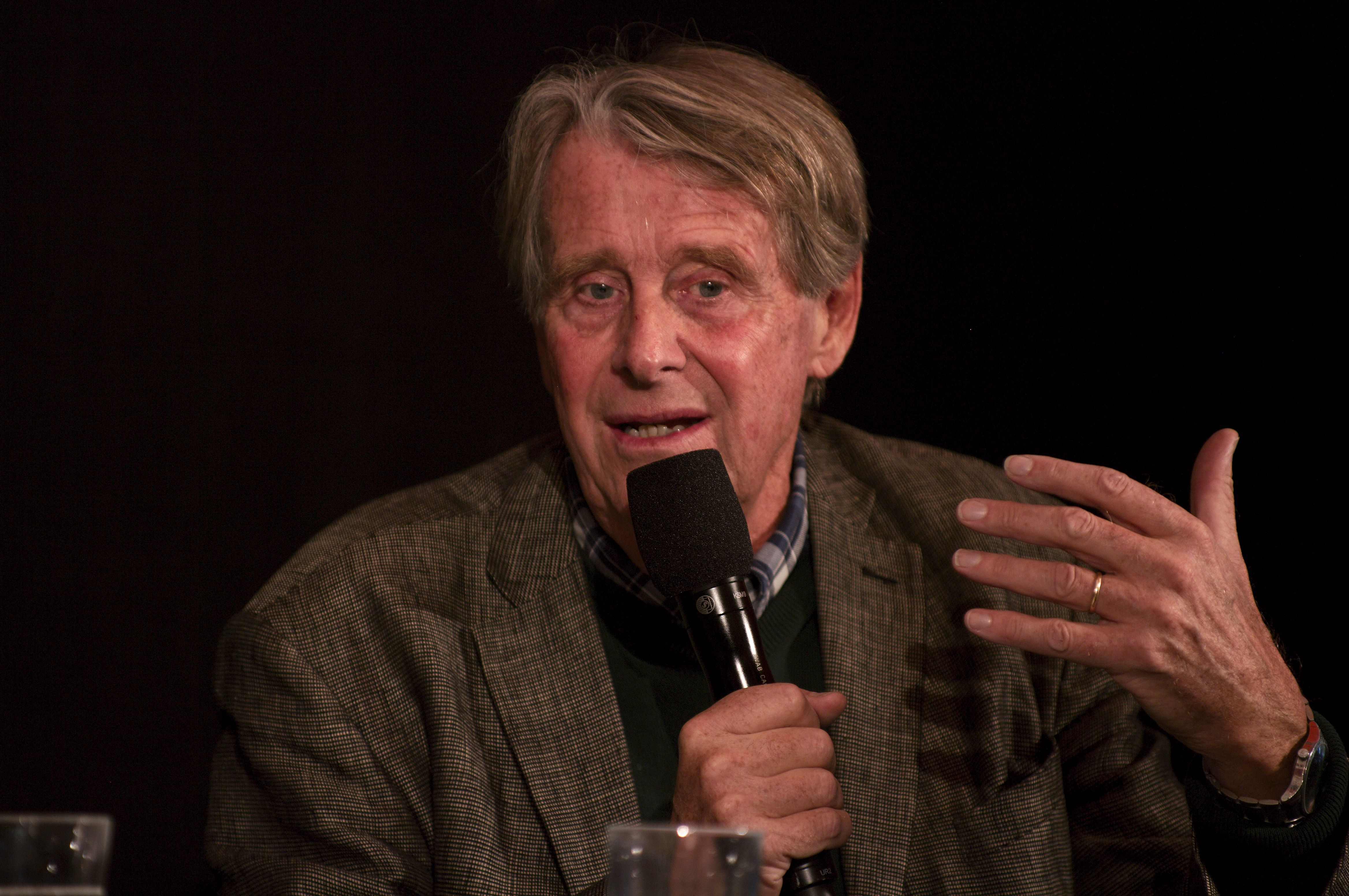 Knut Faldbakken @ Oslo bokfestival 2011.